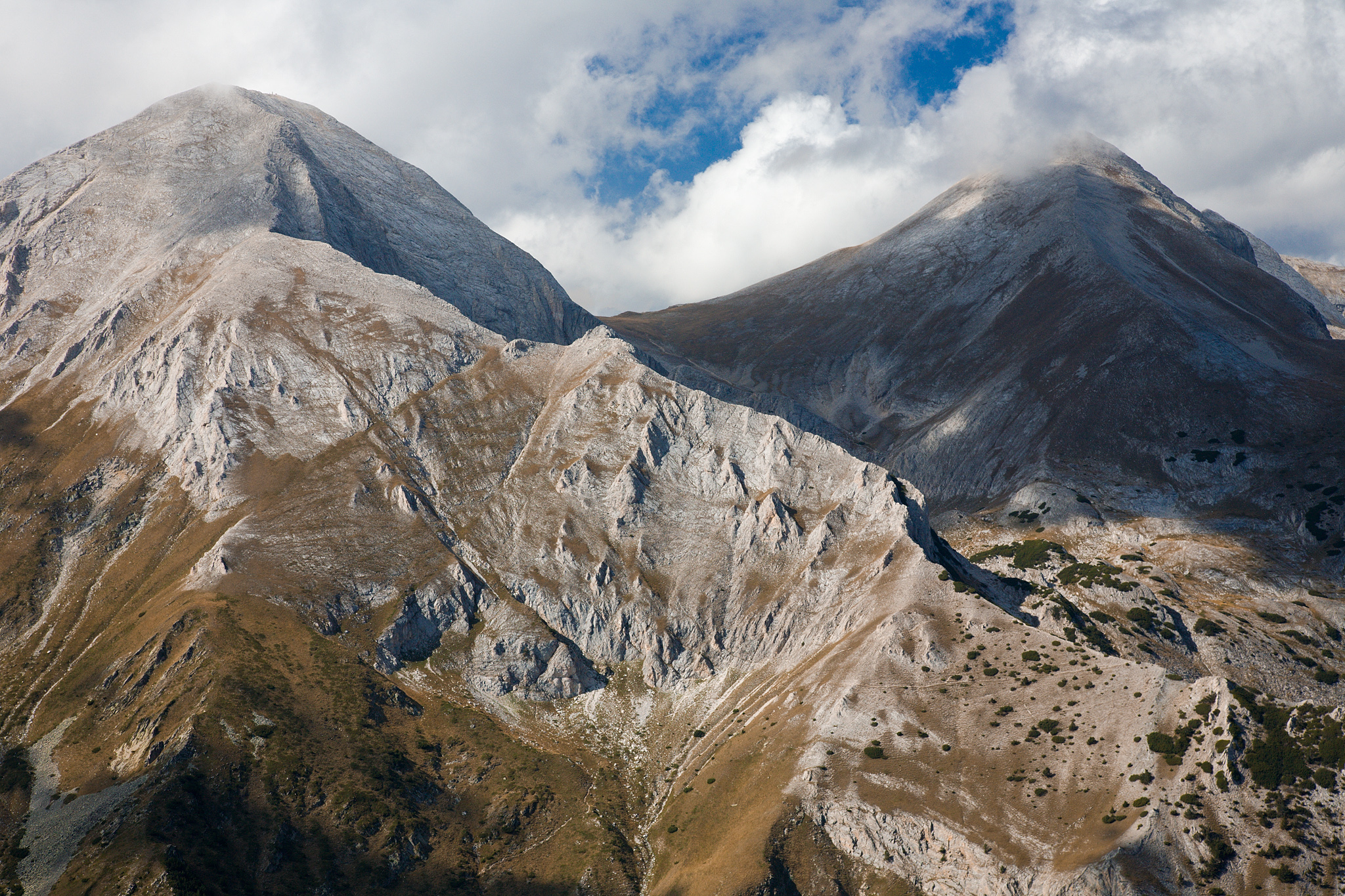 Пирин, връх Вихрен в Пирин планина